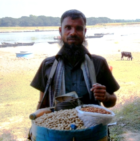 সচরাচর বাদাম ফেরী করে বিক্রি করা হয়